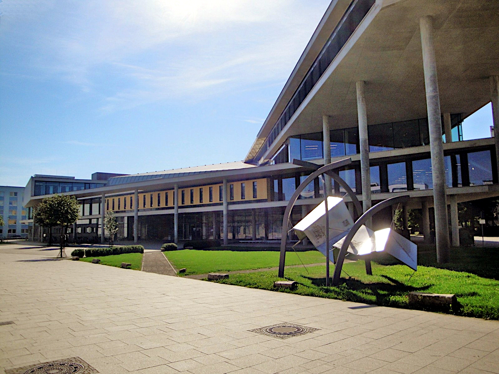 Universitätsbibliothek der Otto-von-Guericke-Universität Magdeburg. Ansicht von der Campusseite.